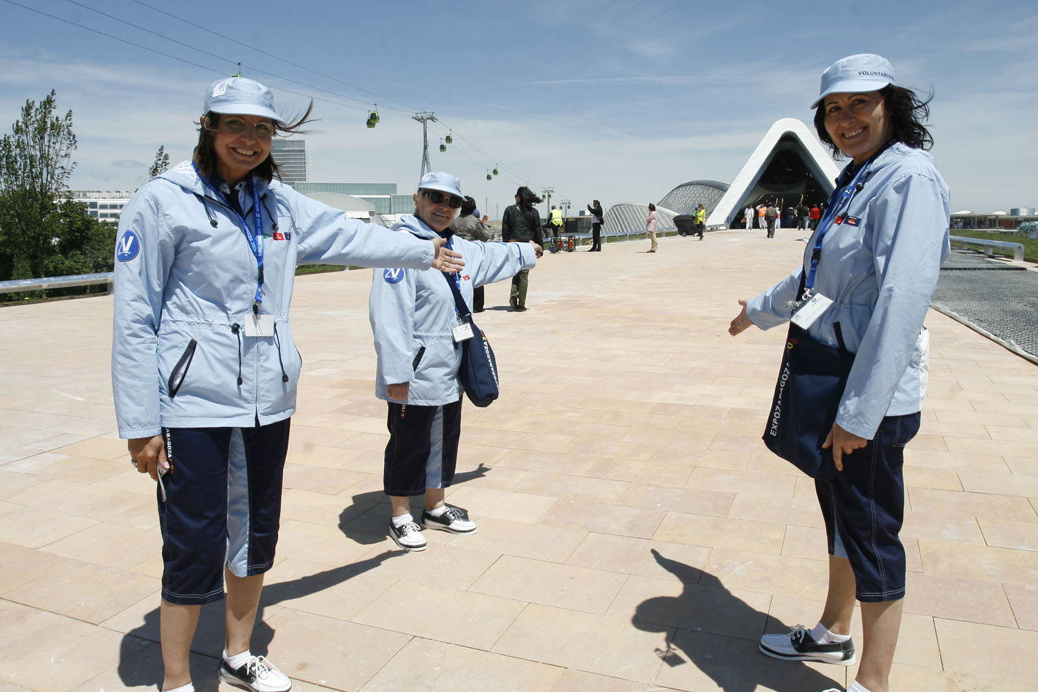 Voluntarios de la EXPO de Zaragoza 2008 Antes de comenzar la Muestra